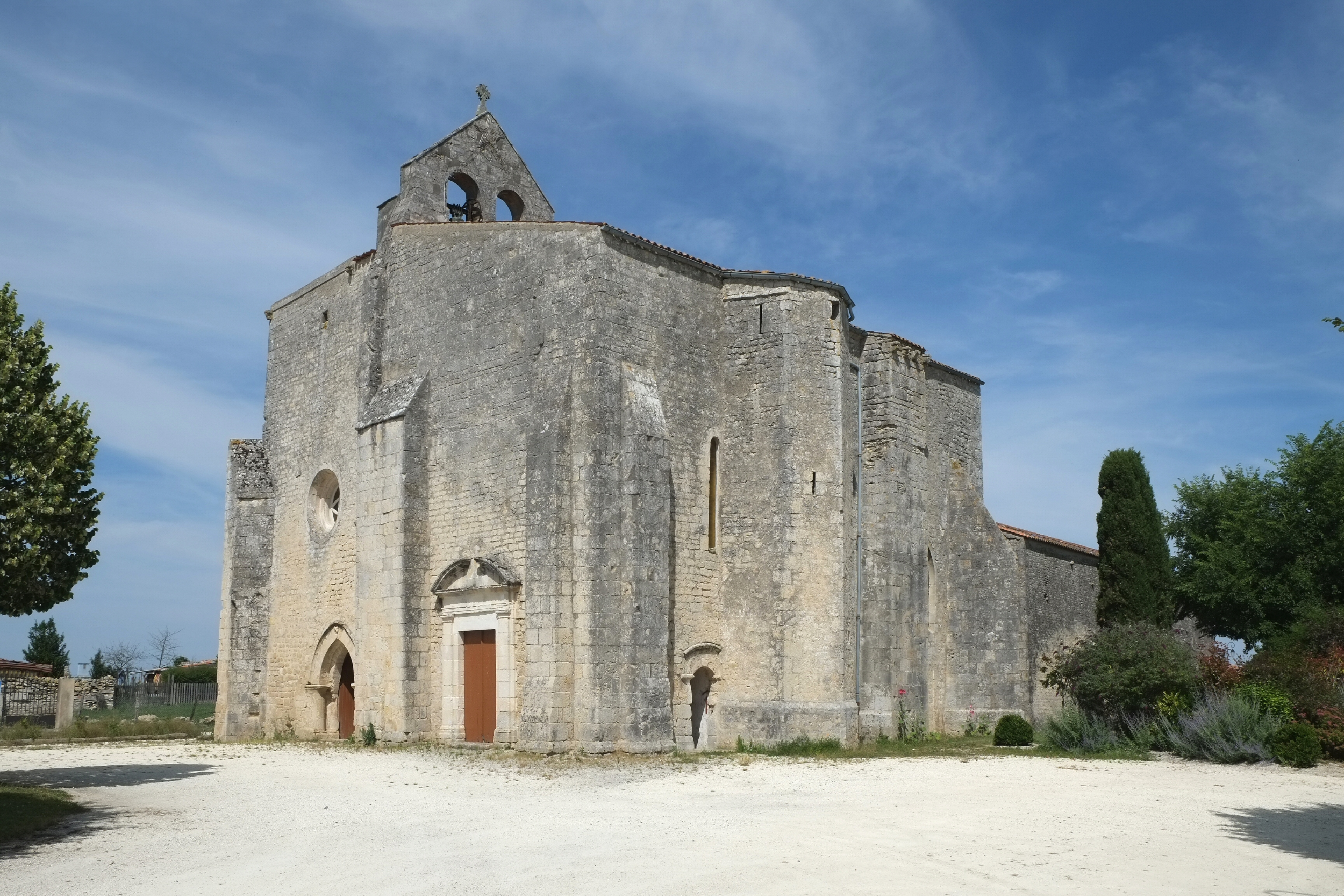 Église Sainte-Trinité Puyravault Charente-Maritime France